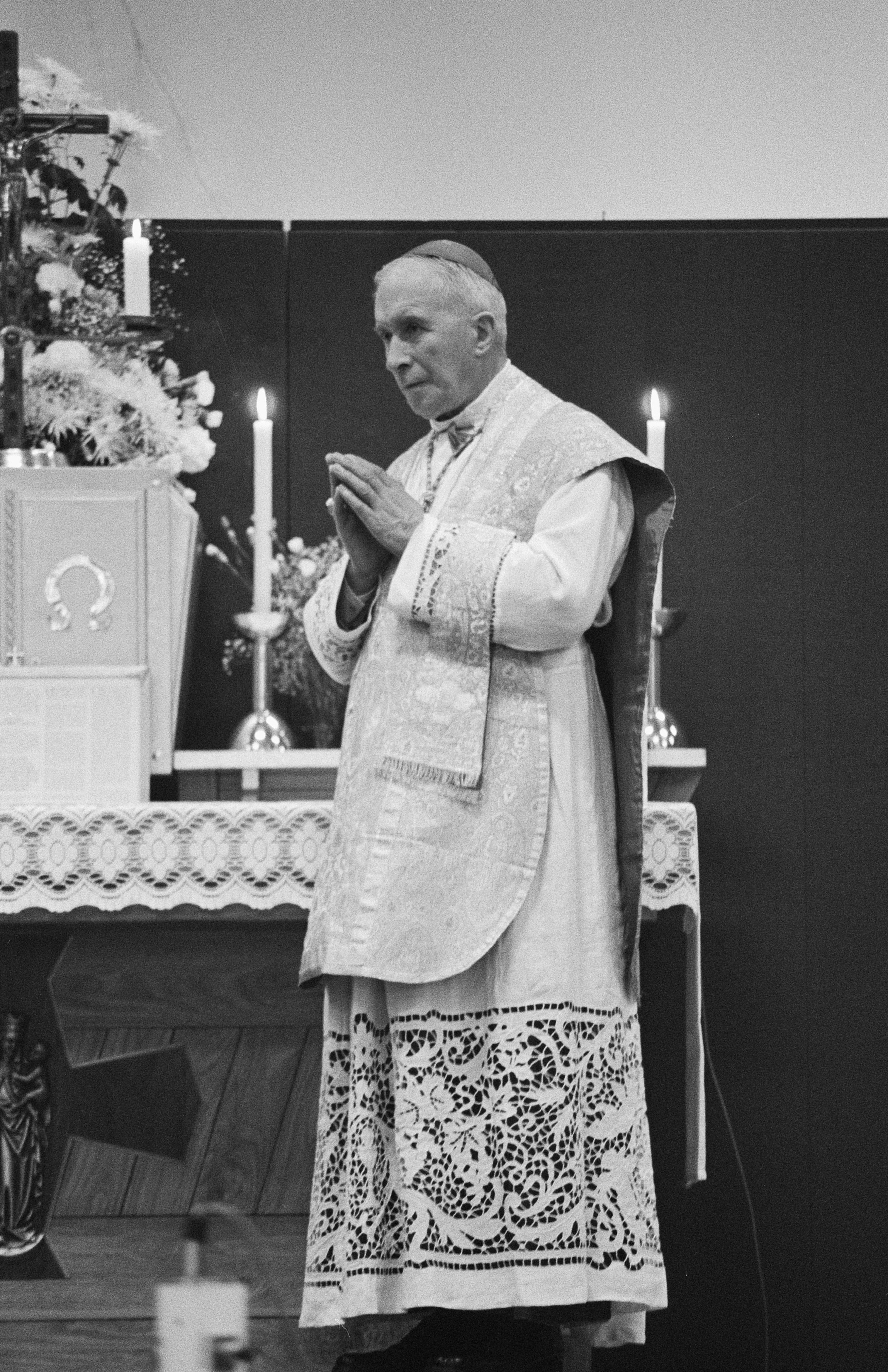 In Veldhoven heeft de uit zijn ambt ontheven Franse aartsbisschop Lefebure een mis opgedragen volgens de oude ritus; mgr. Lefebure (kop)